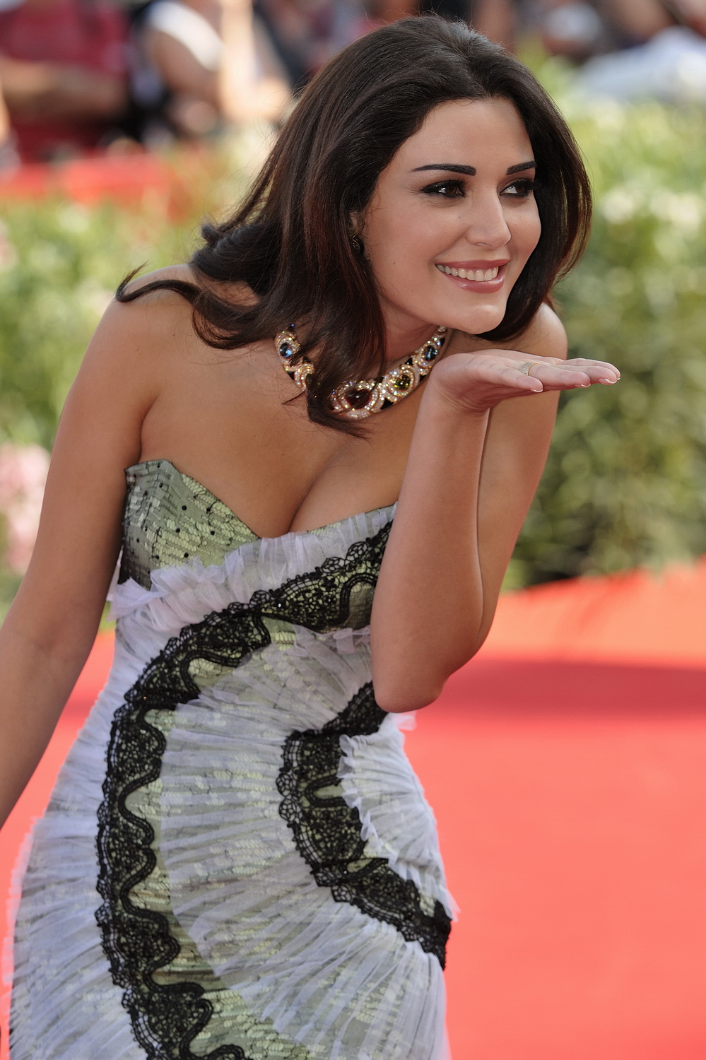 66ème Festival du Cinéma de Venise (Mostra), 9ème jour (10/09/2009) Tapis rouge avec Omar Sharif et Cyrine AbdelNour pour le film The Traveller de Ahmed Maher